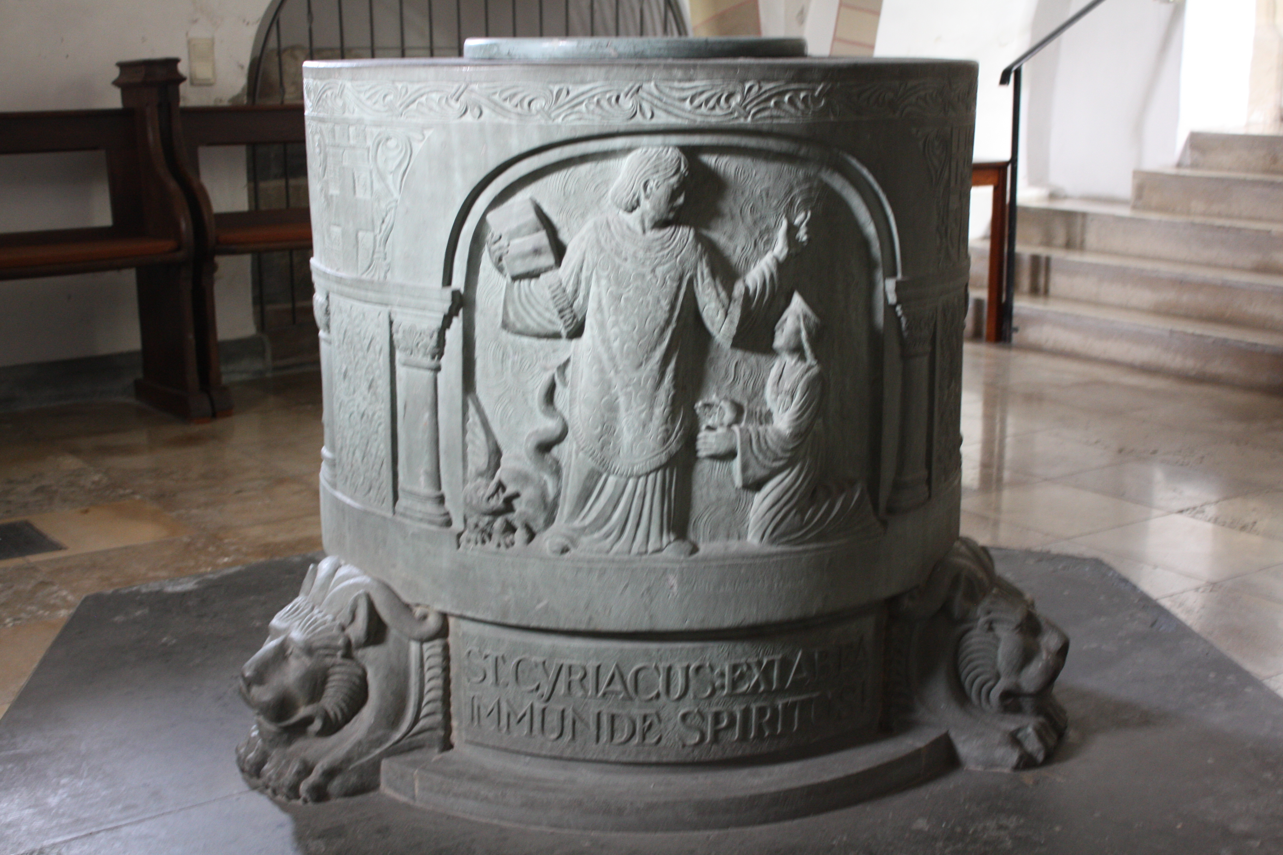 Taufstein von St. Cyriakus Geseke